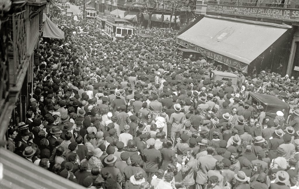 Título original: Concentración de personas en la calle Loiola saludando al medico Fernando Asuero (4/4) Localización: San Sebastián (Guipúzcoa)